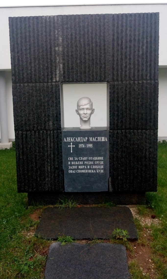 Srpski (latinica): Spomenik Aleksandru Masleši u Trebinju, u naselju Bregovi.